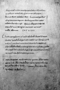 Wiener Hundesegen, althochdeutscher Segensspruch in einer Handschrift des 10. Jahrhunderts überliefert (Codex 552 der Österreichischen Nationalbibliothek).